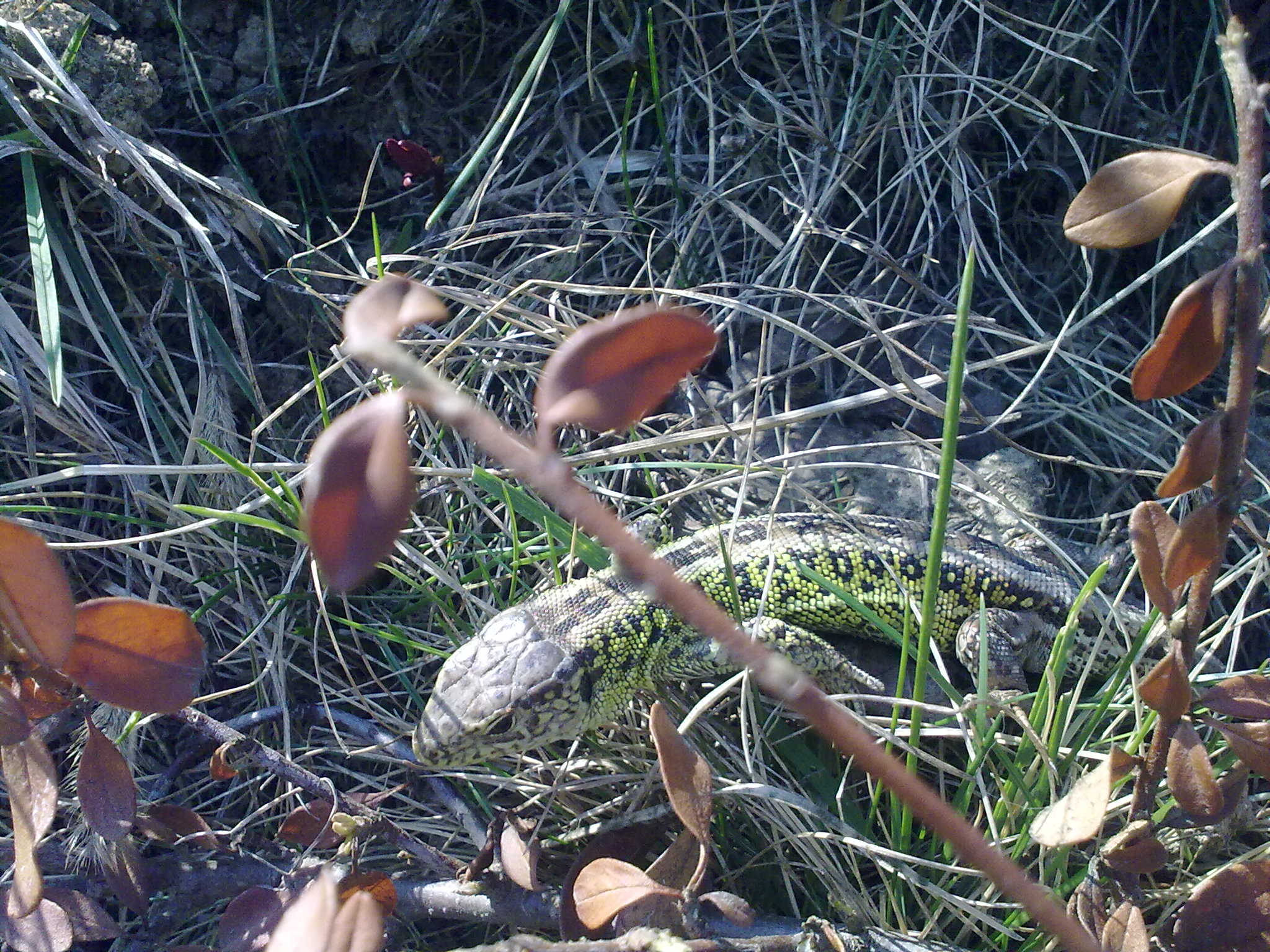 Samica jaszczurki zwinki